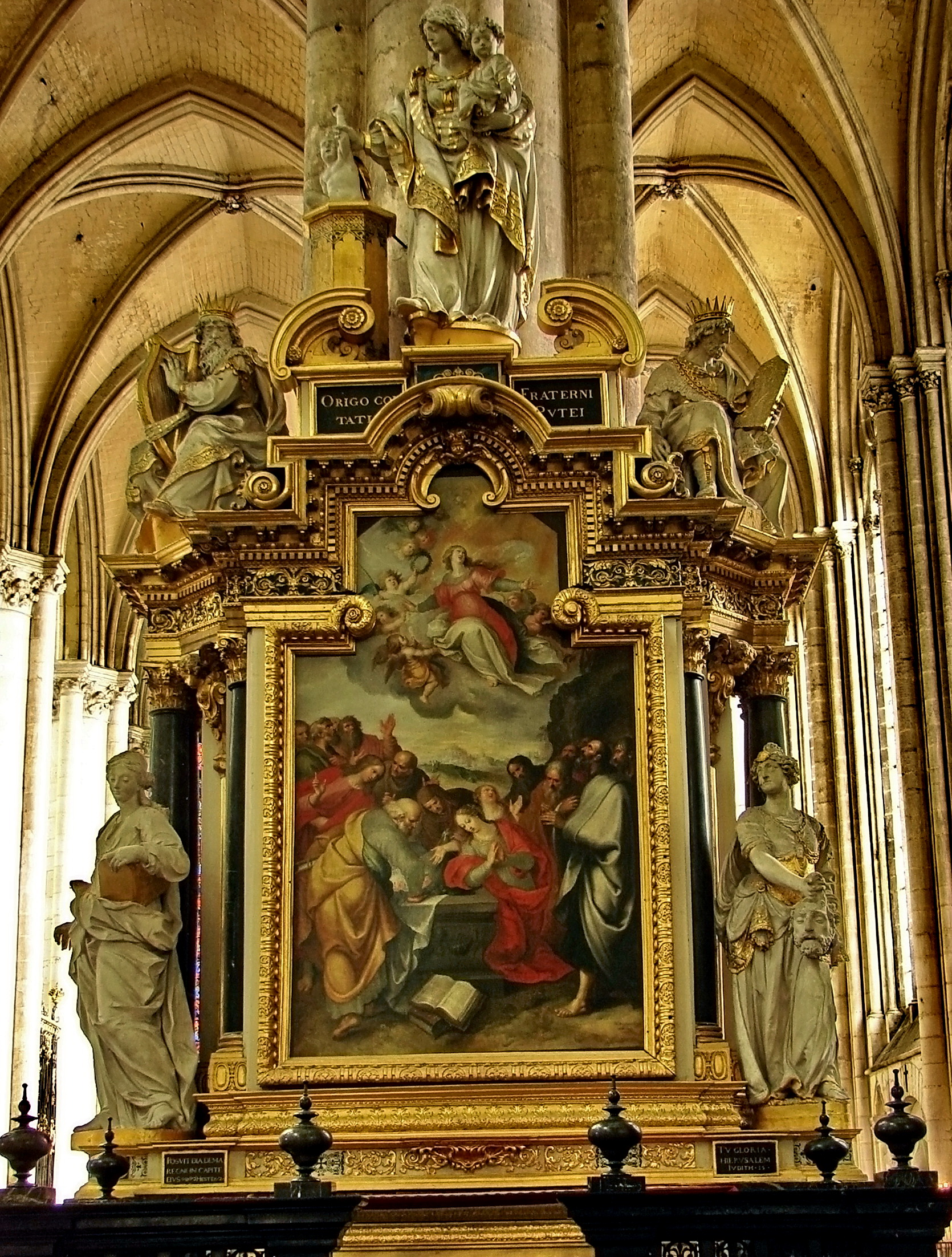 Chapelle de Notre-Dame du Pilier Rouge ou de Notre-Dame de Puy; oeuvre de Nicolas Blasset, offerte en 1627 par Antoine Pingre, maître de la Confrérie du Puy. En haut: la Vierge tirant un enfant d'un puits, entre David et Salomon. En bas, de gauche à droite: Sainte Geneviève, par Cressent (qui remplace l'Esther de N. Blasset, détruite à la Révolution), l'Assomption de la Vierge par François Francken le Jeune (1628), Judith tenant la tête d'Holopherne. Cathédrale Notre-Dame d'Amiens.